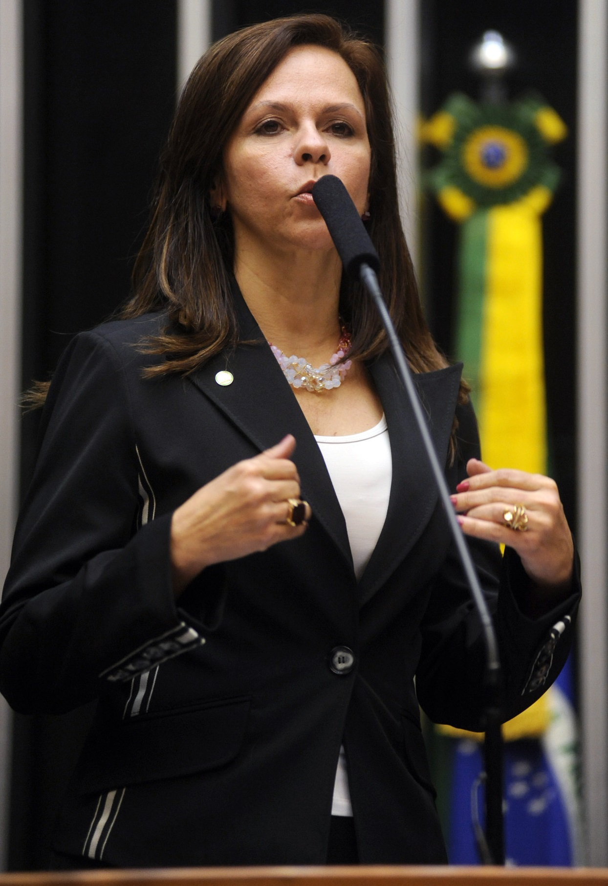 Dorinha Rezende em março de 2012.